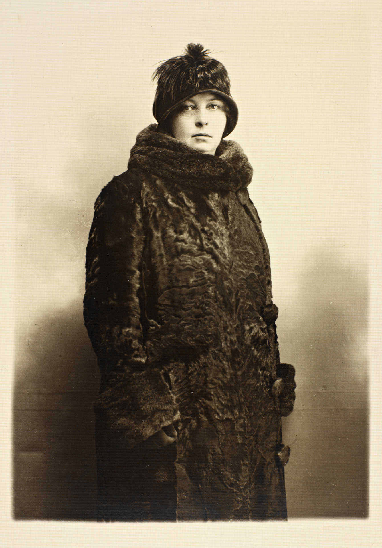 Tittel / Title: Portrett av Sigrid Undset (1882-1949) Motiv / Motif: Iført kåpe hun kjøpte i forbindelse med reise til Stockholm for å motta Nobelprisen i litteratur. Dato / Date: 1928 Fotograf / Photographer: Alvilde Torp (1853-1939) Sted / Place: Oppland, Lillehammer Eier / Owner Institution: Nasjonalbiblioteket / National Library of Norway Lenke / Link: Bildesignatur / Image Number: blds_01124